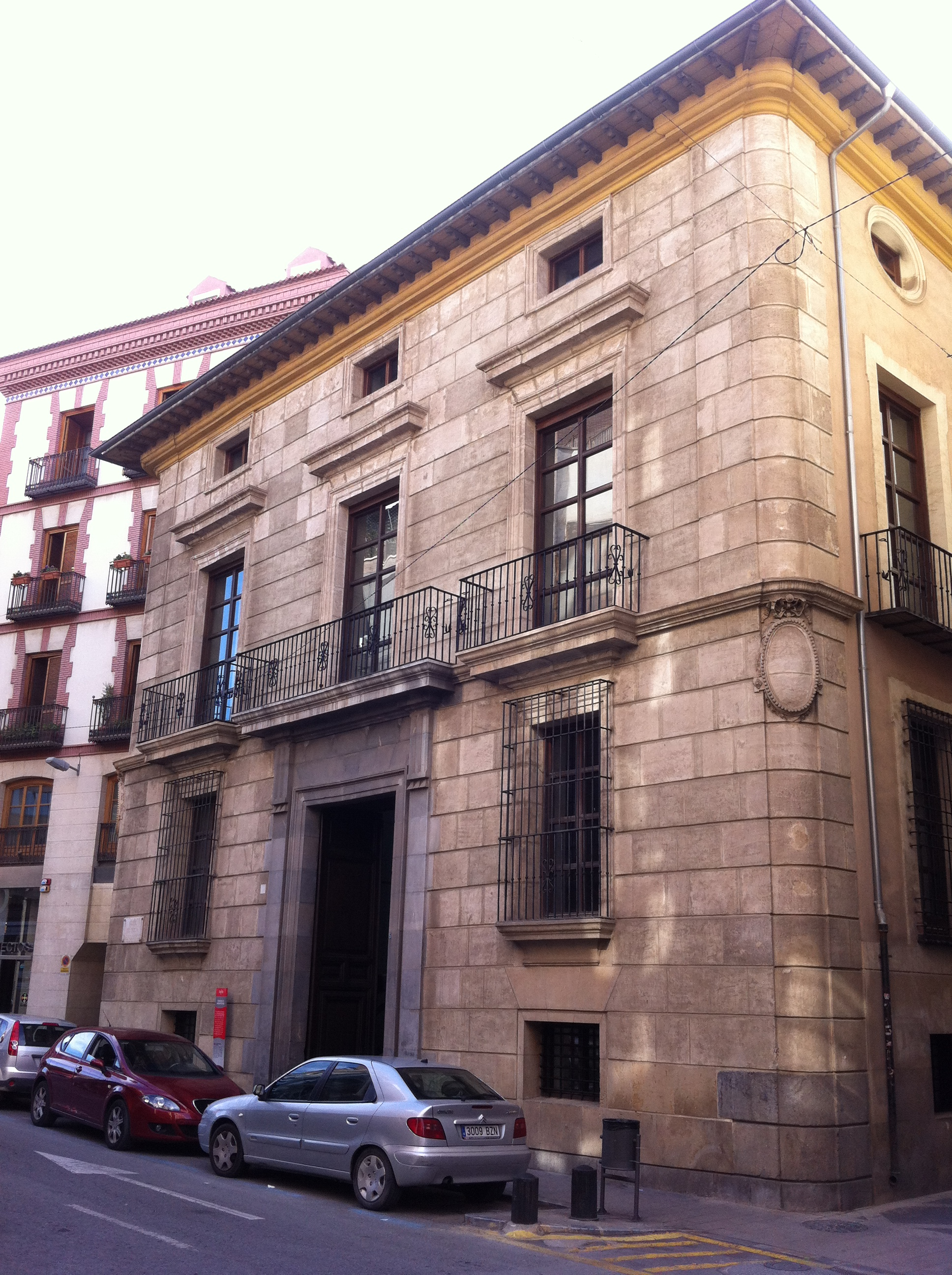 Palacio de la Inquisición de Murcia (Región de Murcia, España). De principios del siglo XIX. Actual sede del Colegio de Arquitectos de Murcia.